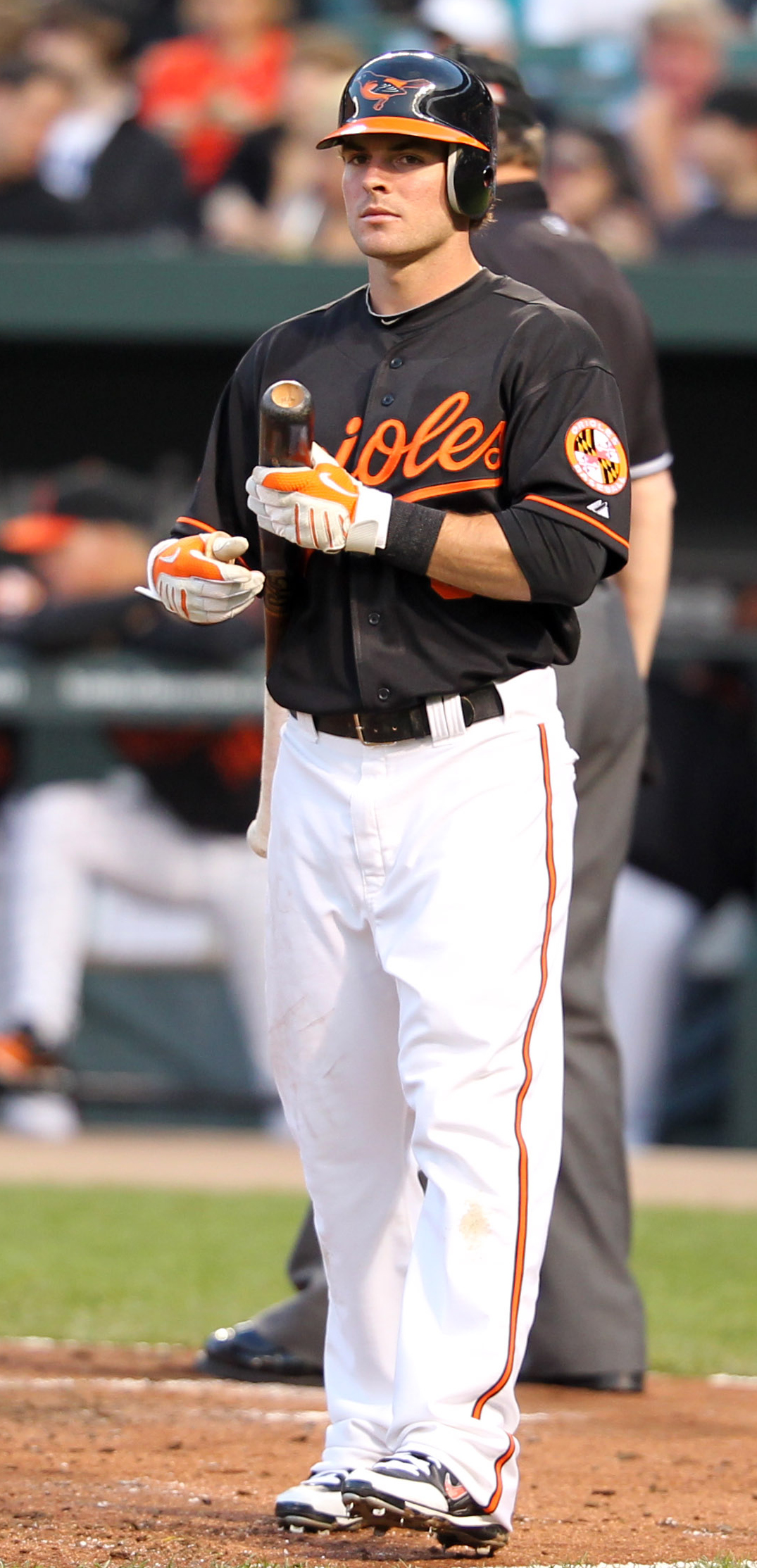 Ryan Adams